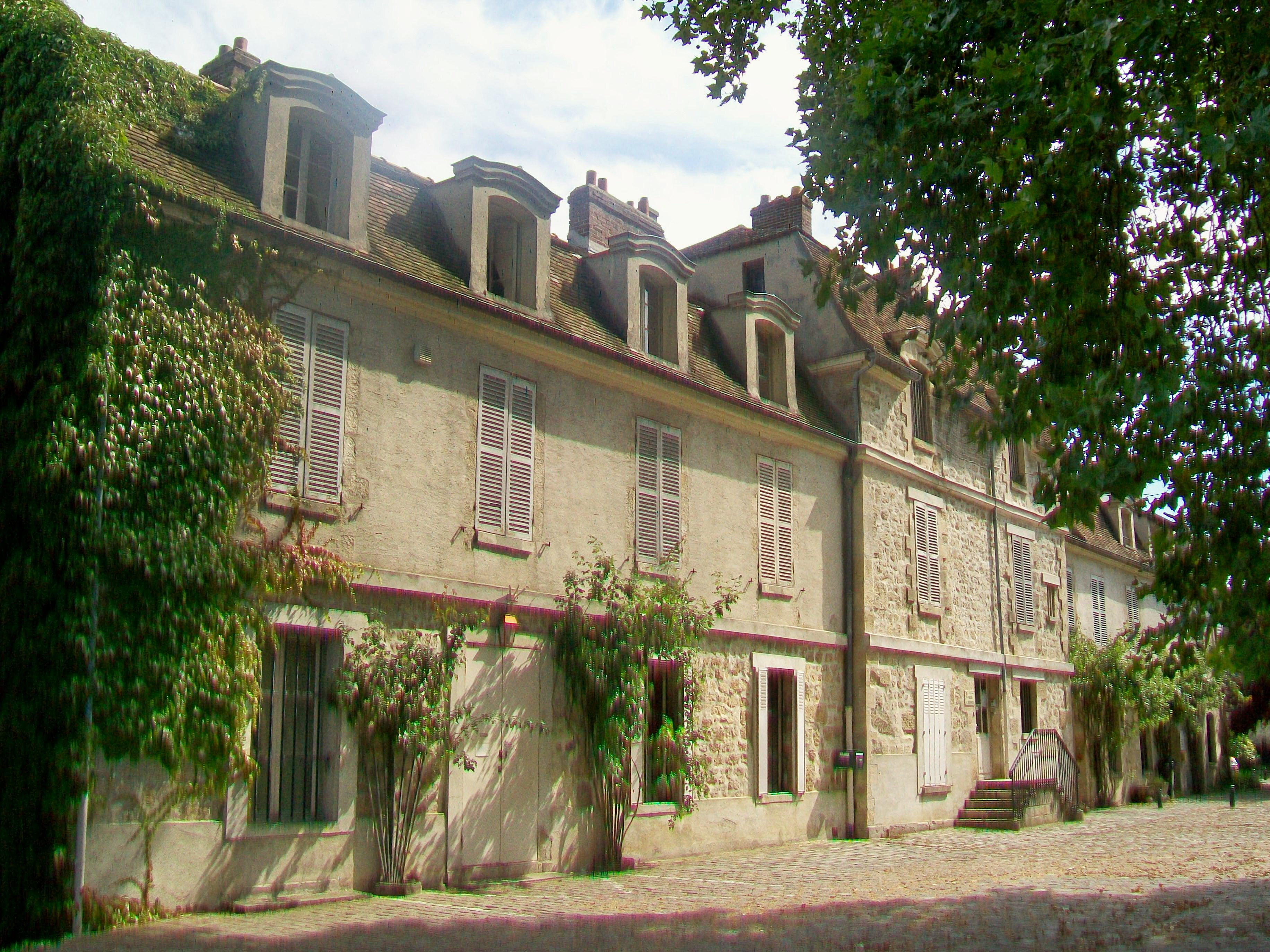 La maison des Josephites de 1660, anciennement musée Henri-Senlecq de 1939 à 2003, aujourd'hui antenne sociale municipale.